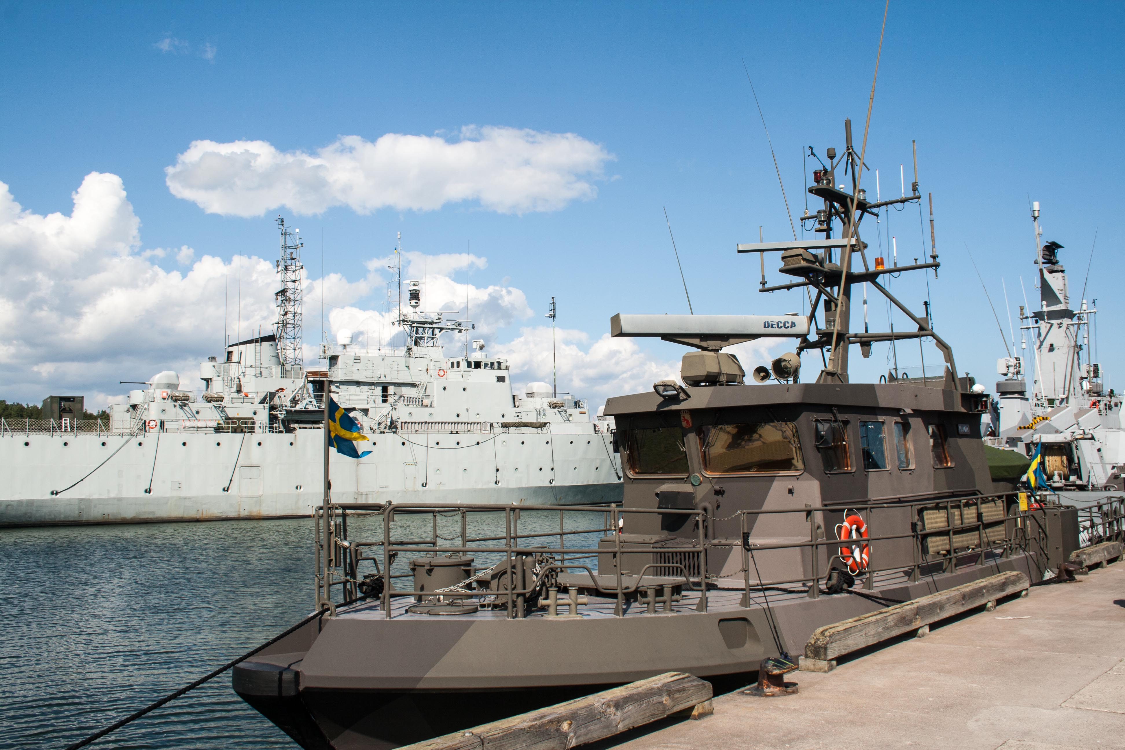 Ships at Berga navy base